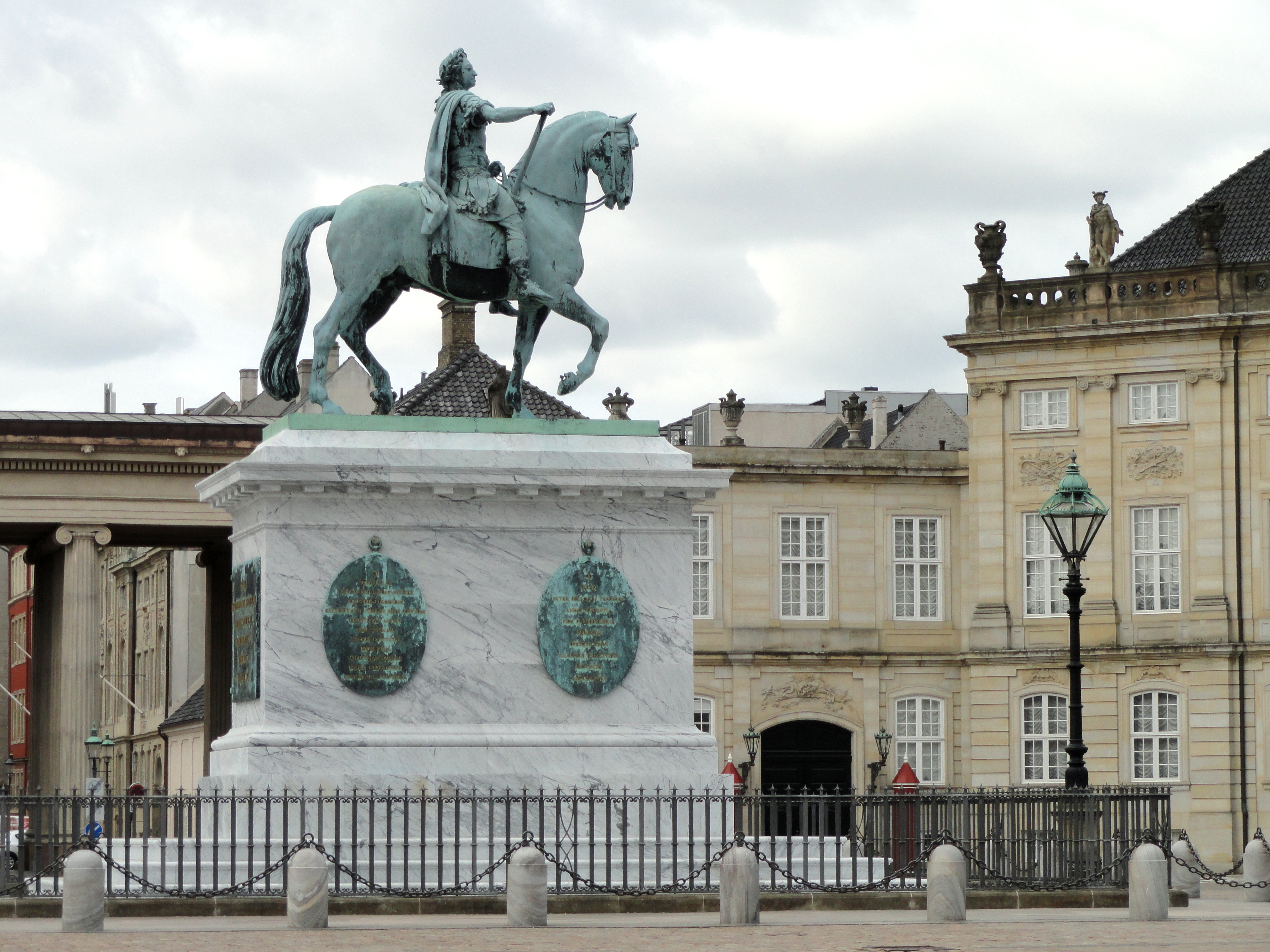 Frederik V statue in Amalienborg Palace courtyard, Copenhagen, Denmark.